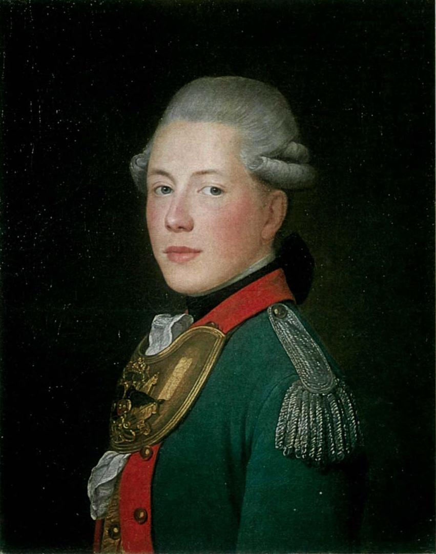 Вяземский, Андрей Иванович (1750—1807) — с 1773 по 1778 командир Вологодского полка, с 1778 генерал-майор, с 1787 генерал-поручик, с 1796 — назначен нижегородским и пензенским генерал-губернатором. По воцарении Павла I в отставке. Сенатор. Отец П. А. Вяземского. Изображен в зеленом мундире офицера армейской пехоты с красным лацканом, с серебряным эполетом на левом плече и нагрудным офицерским знаком.